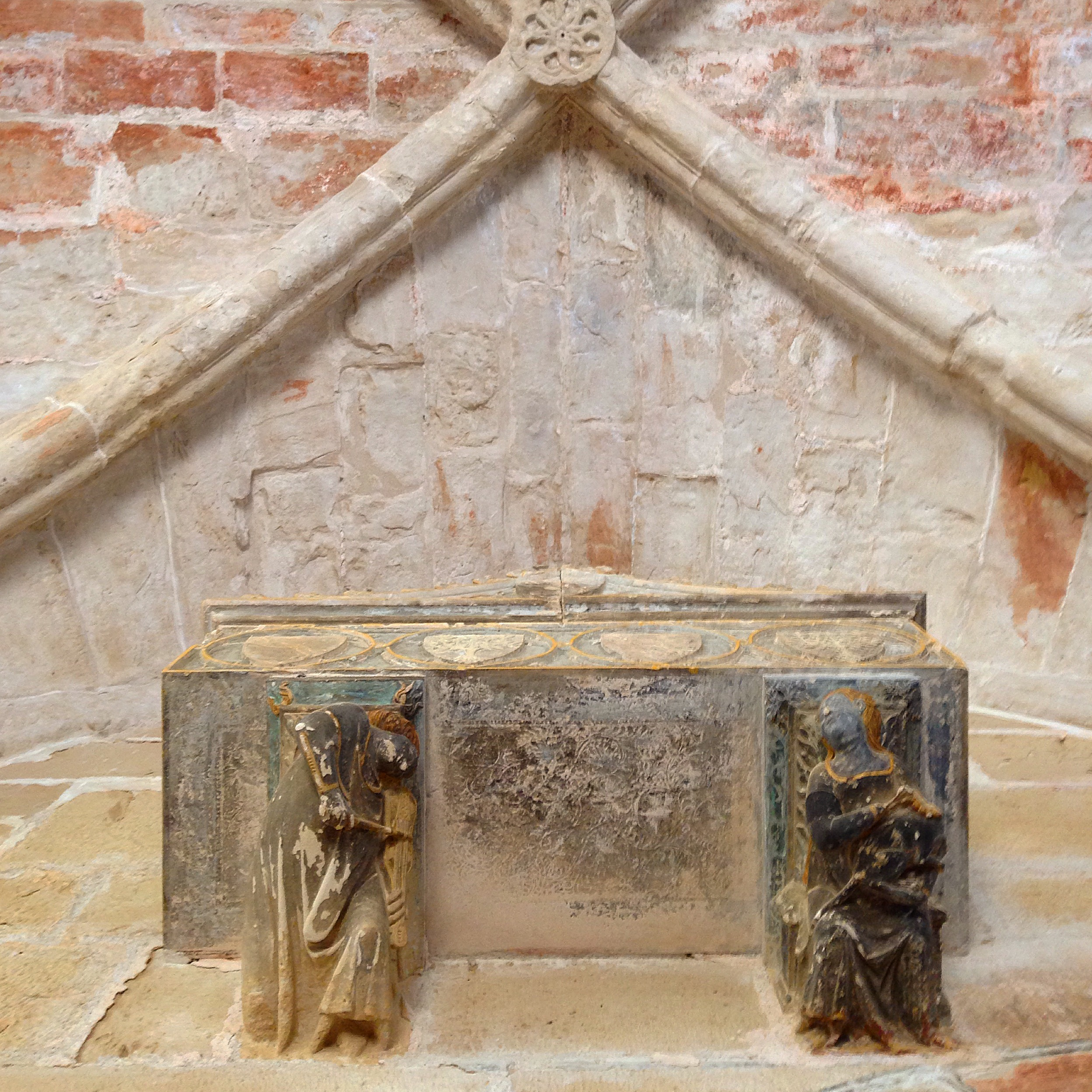 Fídula representada a una mènsula sota un sarcòfag del Monestir de Poblet, a l'esquerra